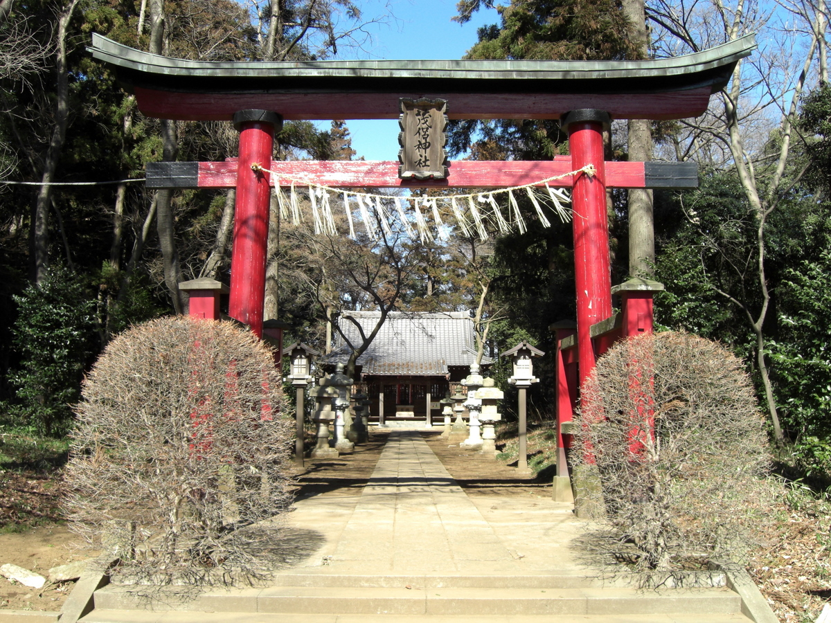 茂侶神社（流山市三輪野山619 ）